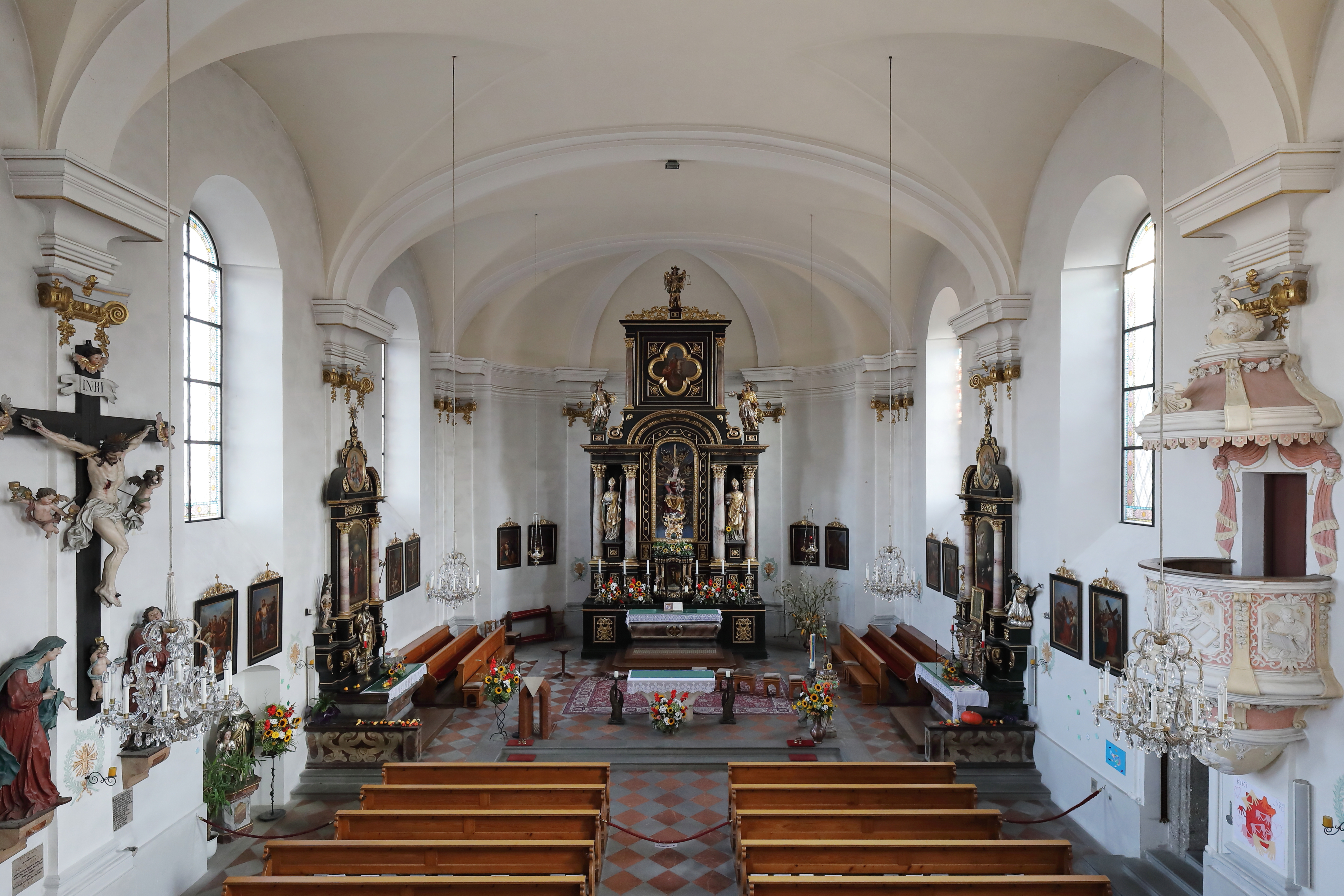 Innenansicht der röm.-kath. Pfarrkirche hl. Martin in der Salzburger Gemeinde Eugendorf. Die Kirche wurde 1736/1737 nach den Plänen des Hofmaurermeisters Tobias Kendler anstelle einer Vorgängerkirche gebaut, 1763 geweiht und 1857 zur Pfarrkirche erhoben.